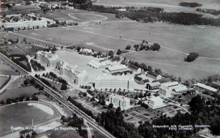 Flygvy över Skövde garnison, i övre vänstra hörnet syns Livregementets husarer, i nedre delen Skaraborgs regemente